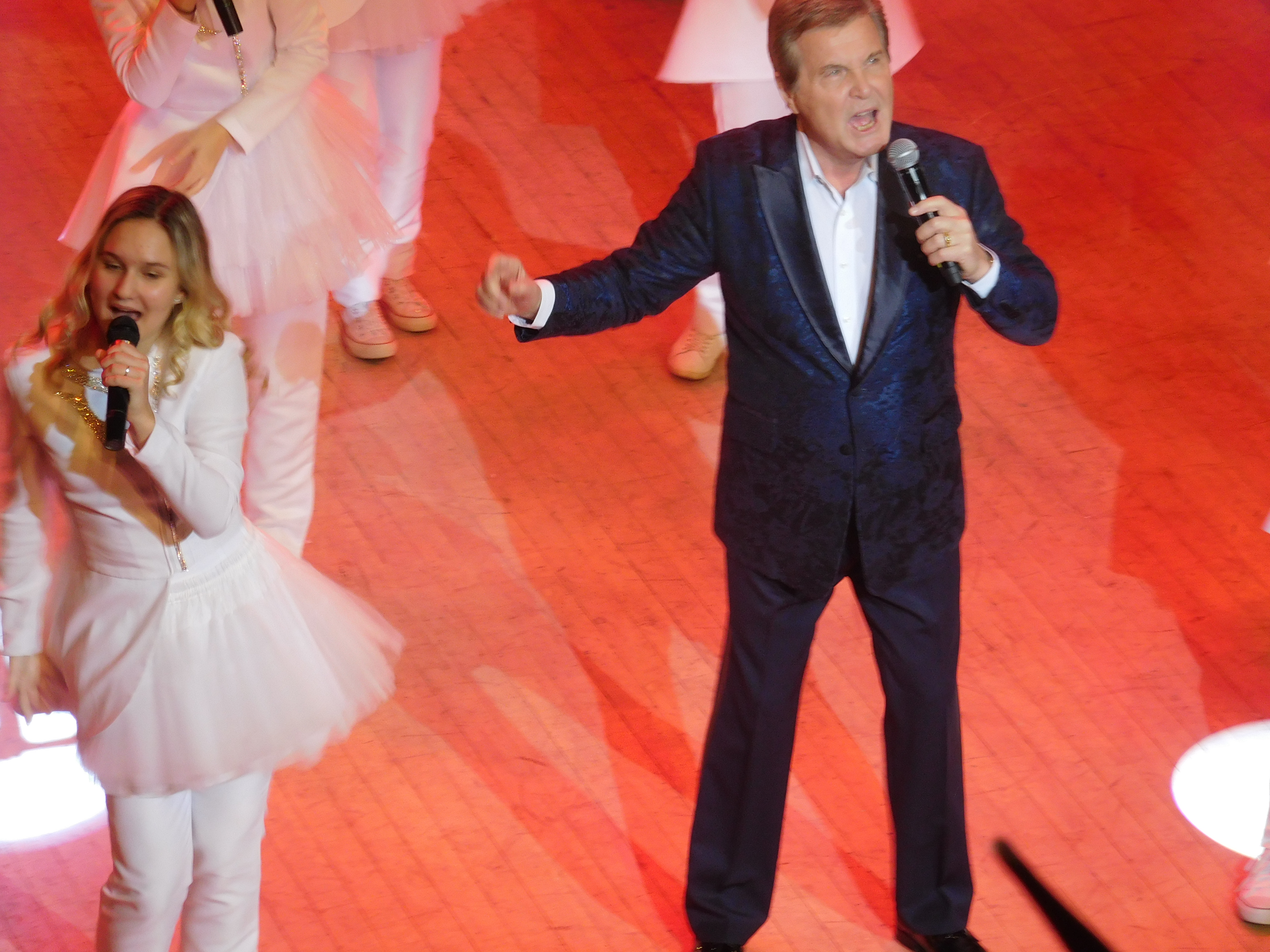 Лев Лещенко на юбилейном концерте ЦДКЖ